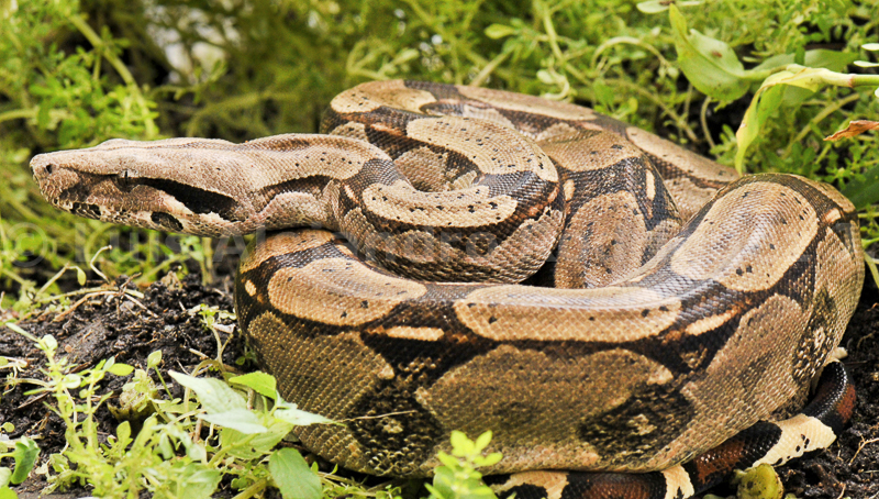 Boa constrictor